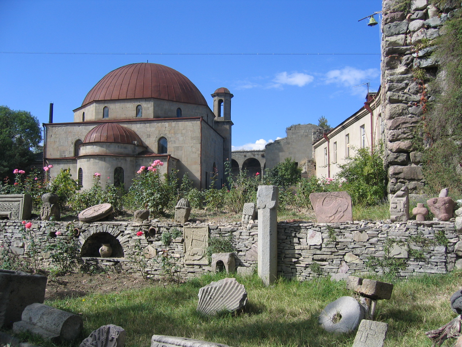 Akhaltsikhe Georgia.